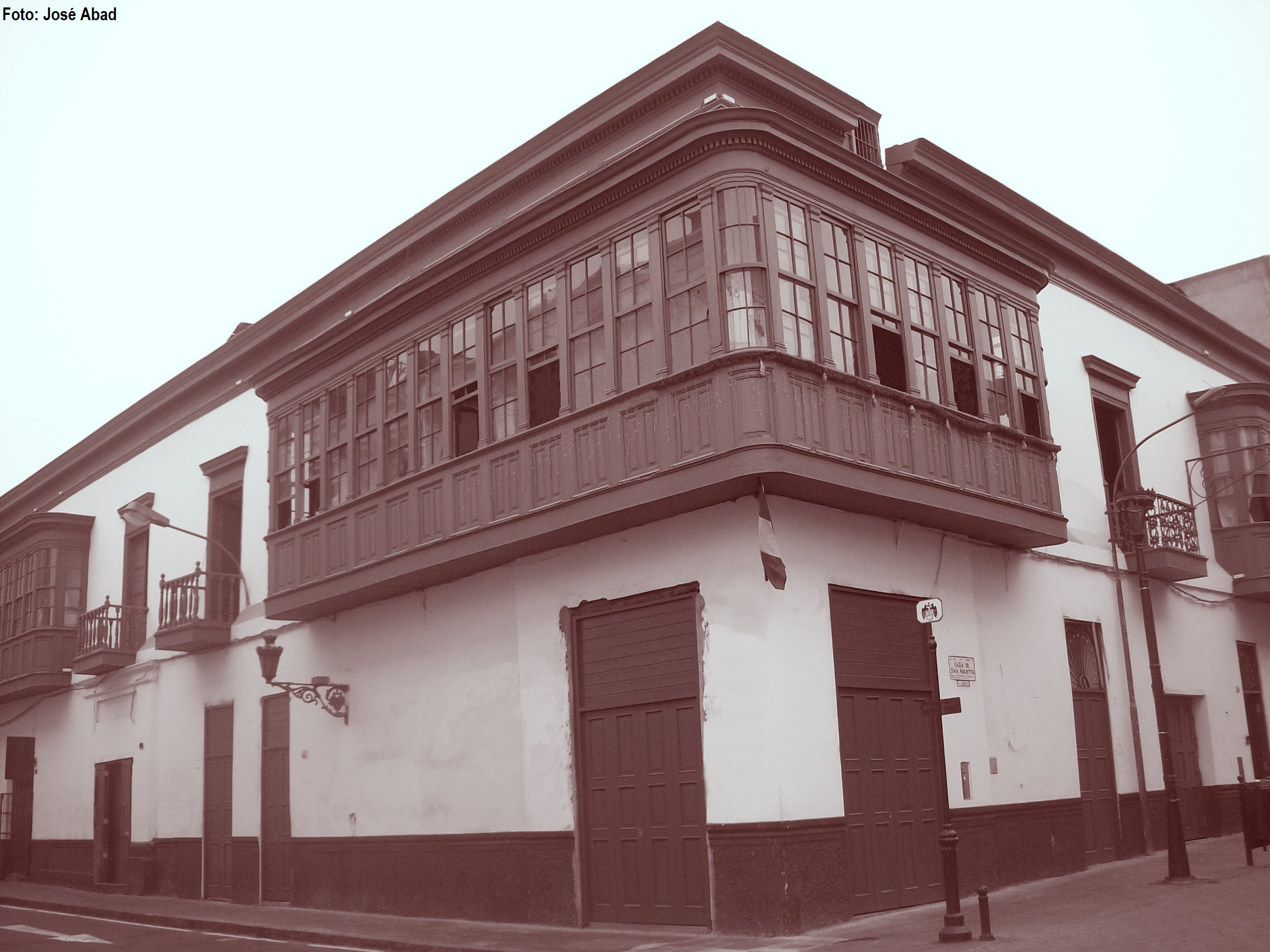 Casa en la segunda cuadra del Jirón Ica, en el Centro Histórico de Lima.